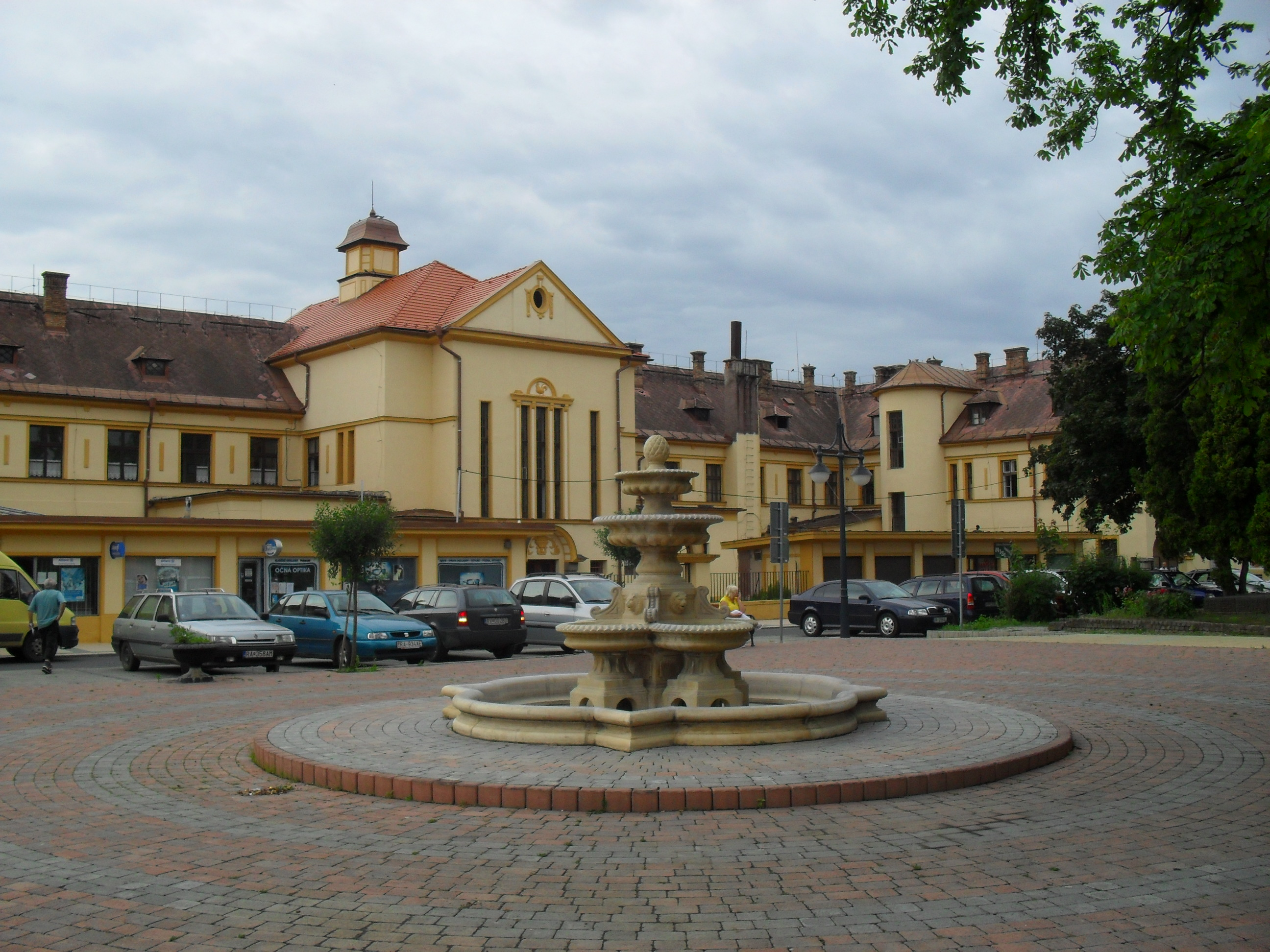 Tornalja - Fő tér